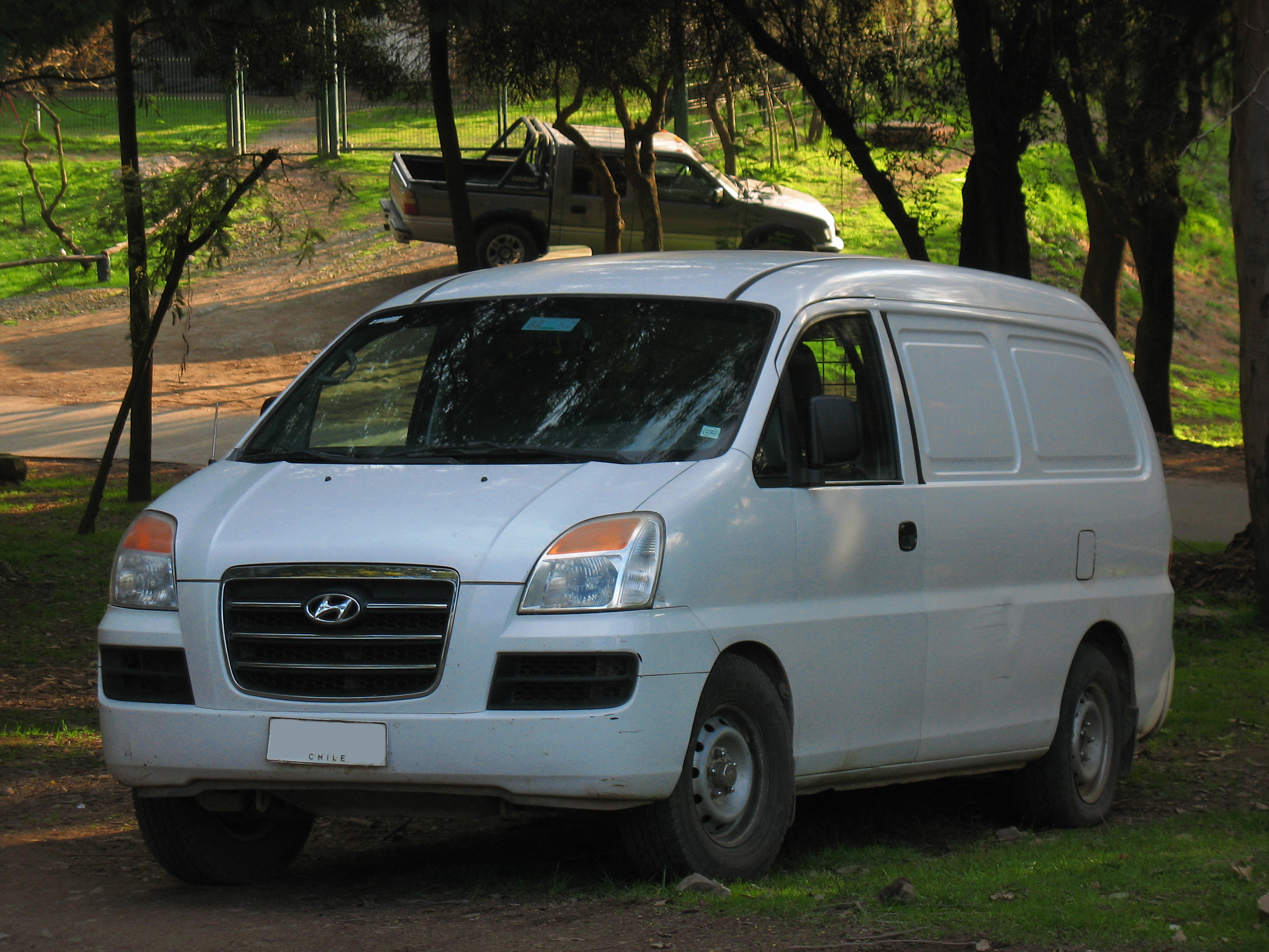 Hyundai H1 SV Cargo 2007